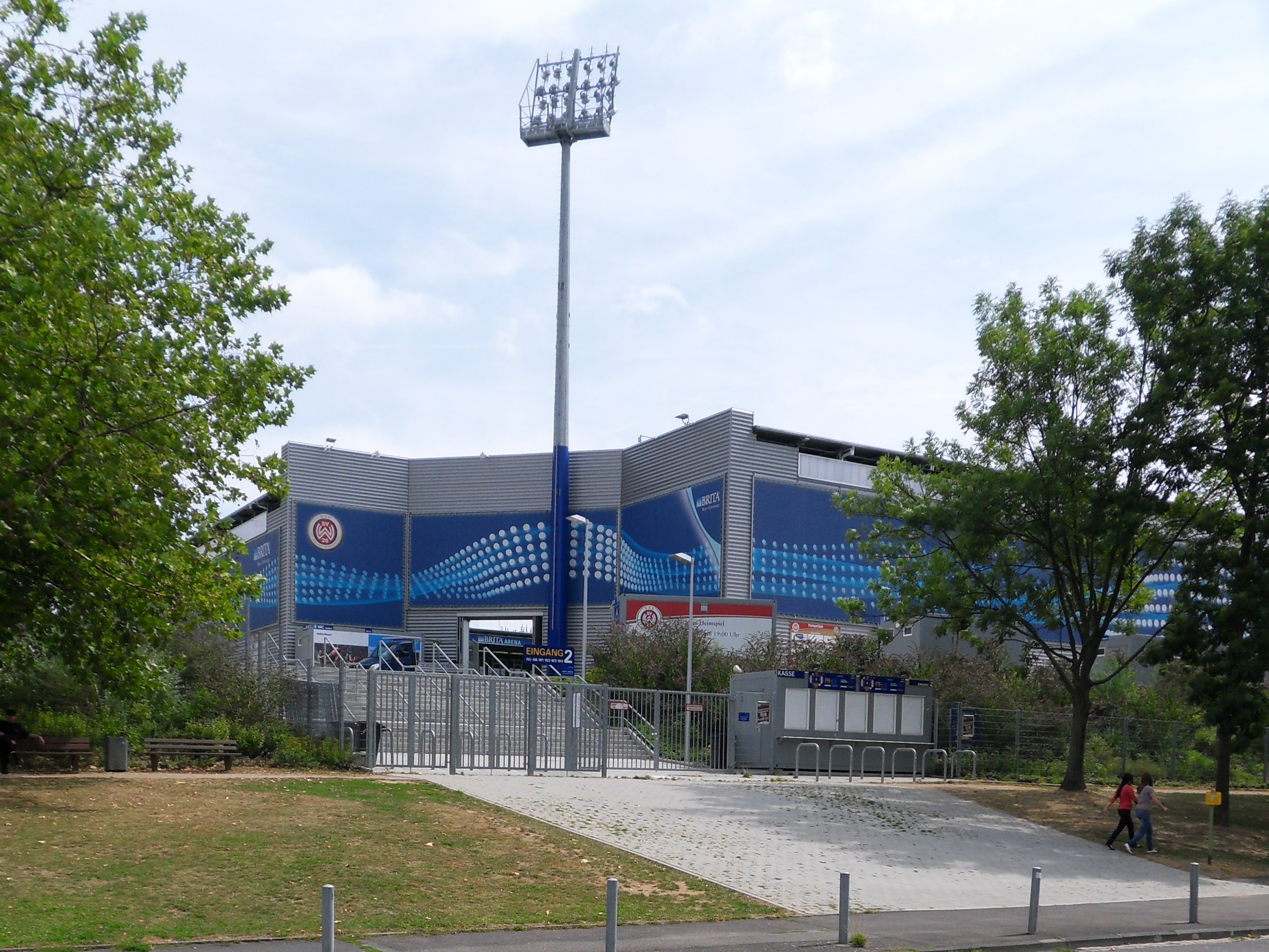 BritaArena des SV Wehen-Wiesbaden, Tor 2 am Gustav-Stresemann-Ring, Blick von Westen